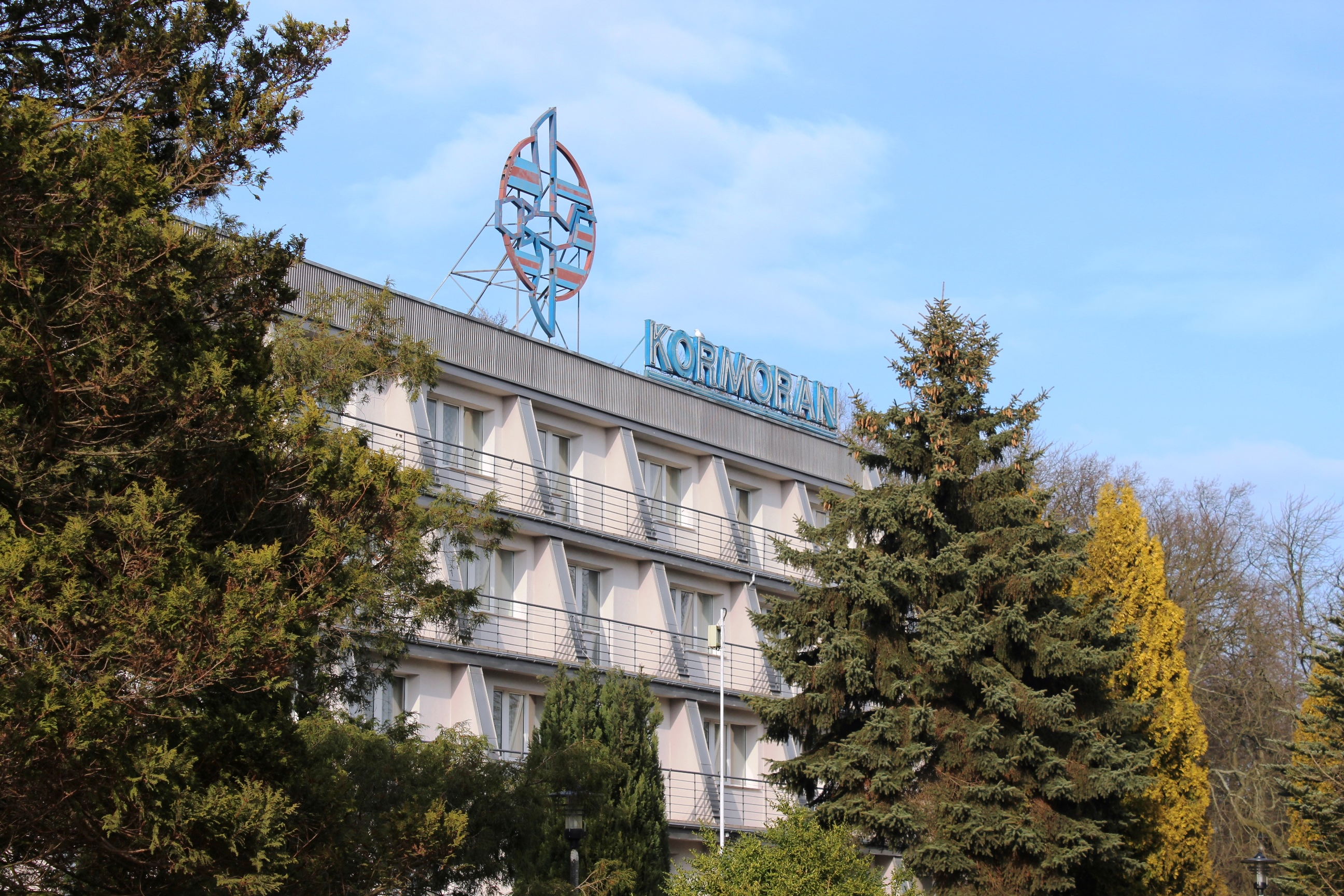 Kormoran Sanatorium in Kołobrzeg